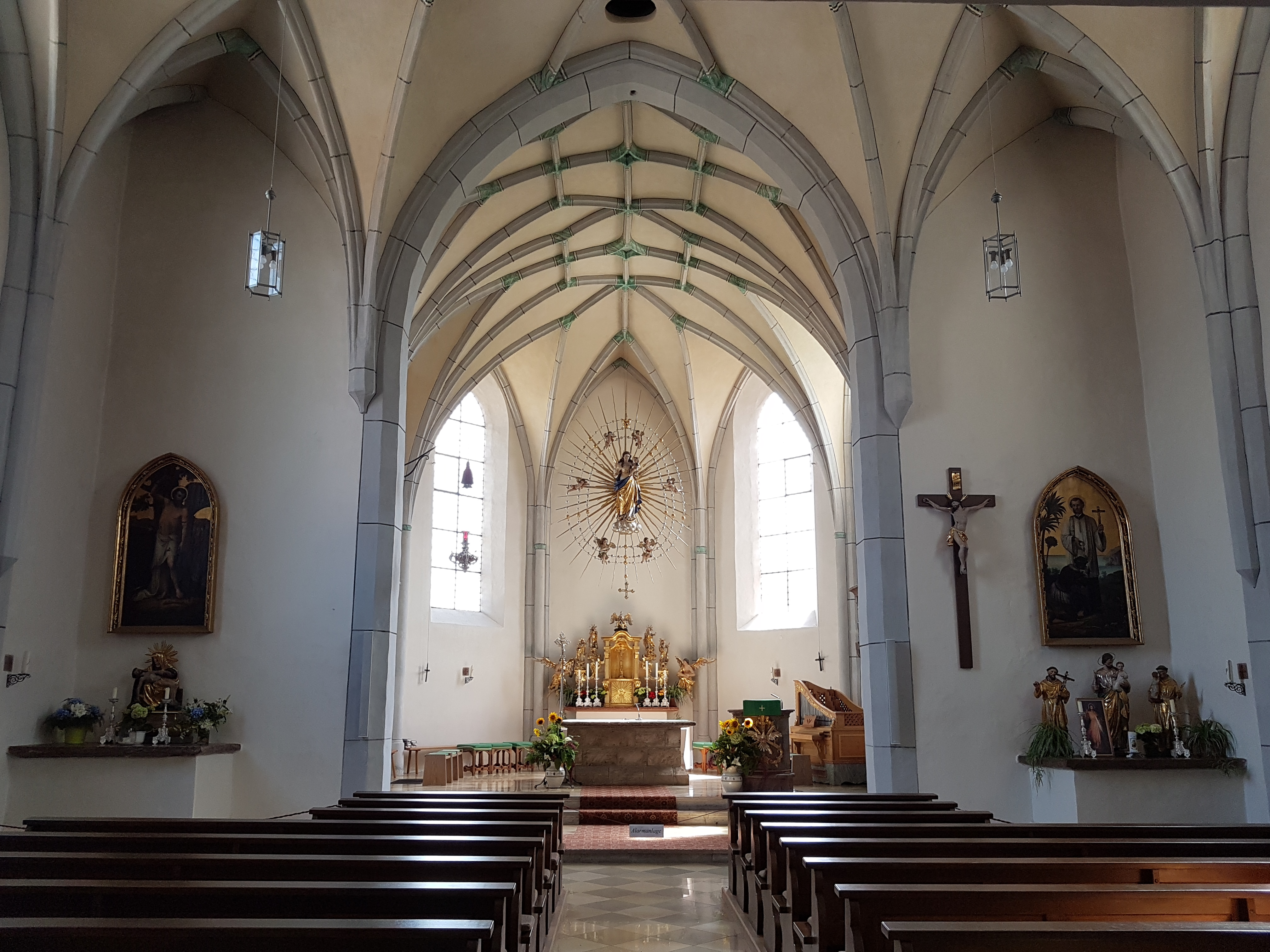 St. Mariä Himmelfahrt (Anger)